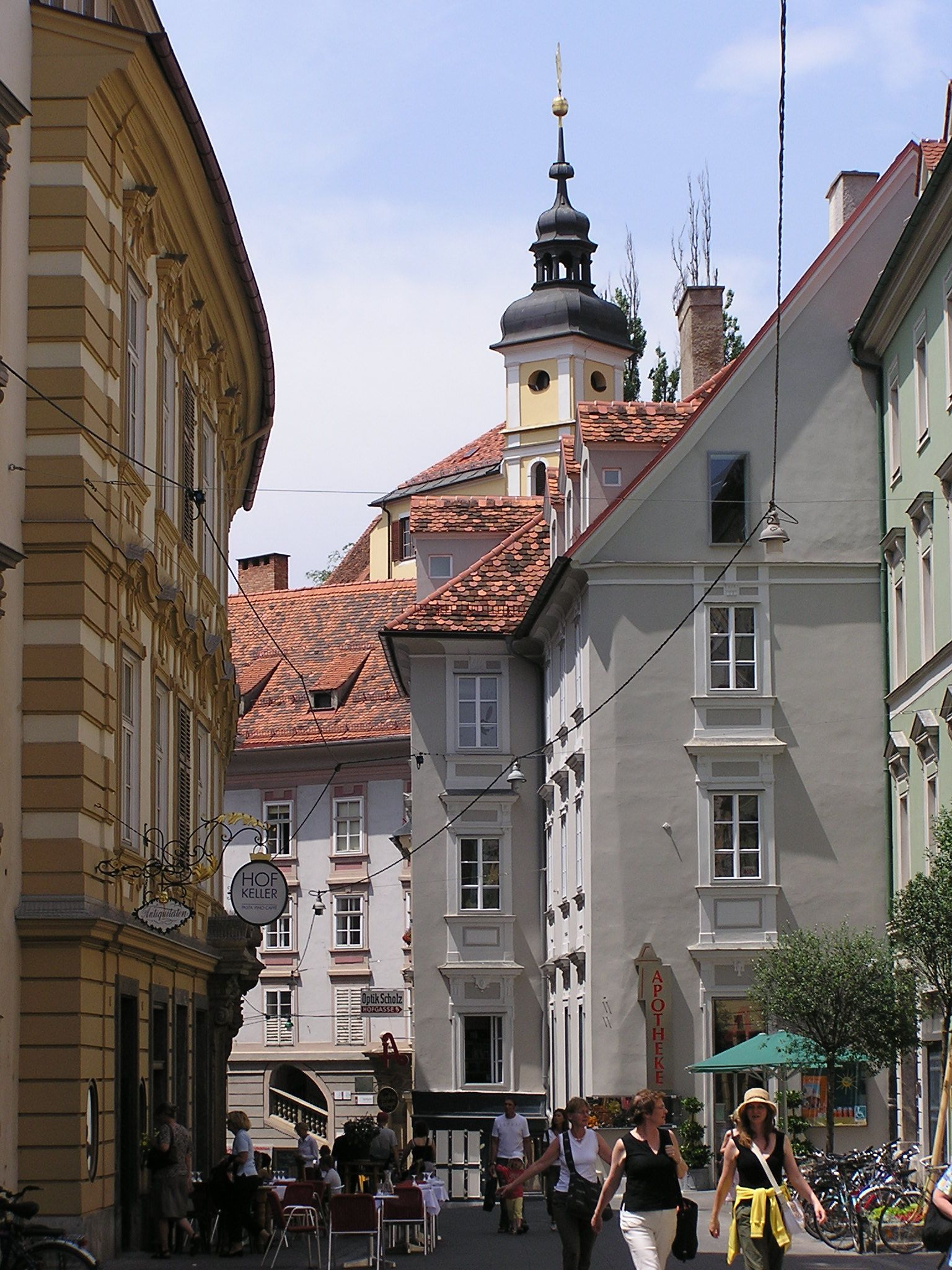 Hofgasse in Graz mit dem Dachreiter der Stiegenkirche